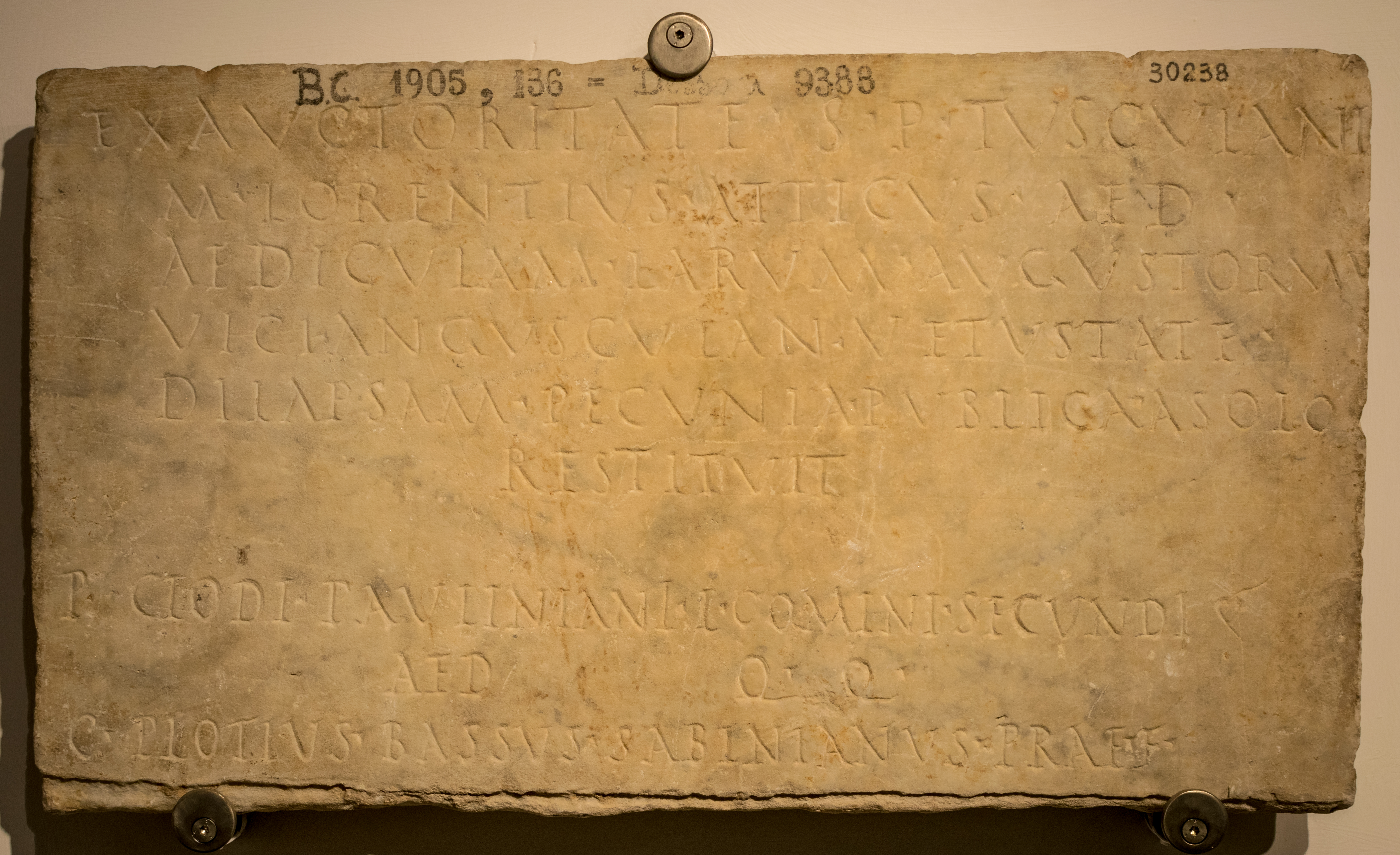 Eine Steintafel aus dem 2. Jahrhundert, die an einem Kultschrein (Ädikula), im Stadtteil vicus Angusculanus aufgestellt war. Der Schrein diente zur Verehrung der Schutzgötter (lares Augusti) des vorgenannten Stadtbezirks. Dieses Bauwerk wurde vom Senat und Volk von Tusculum in Auftrag gegeben und von dem Ädil, M. Lorentius Atticus, realisiert.